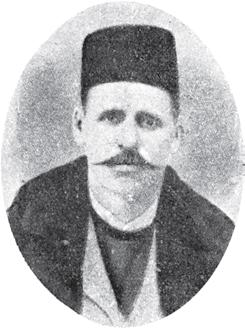 Темелко Хаджиянков.